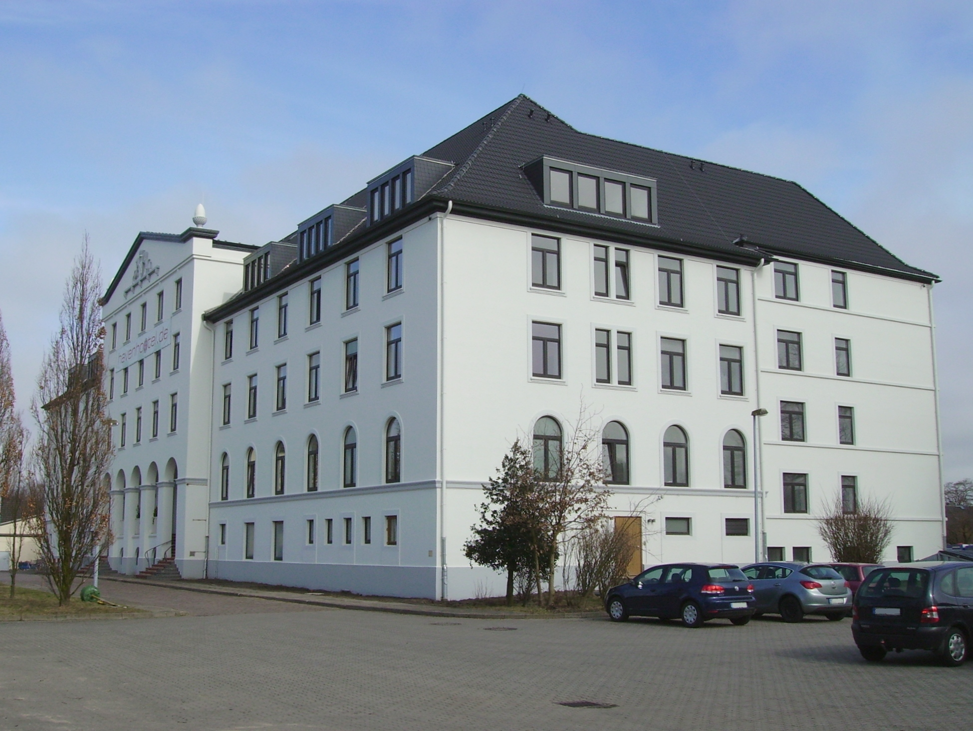 Das havenhostel Bremerhaven, vormals Kaserne Rotersand, errichtet 1925-1926, restauriert ab 2009 Das abgebildete Objekt ist ein geschütztes Kulturdenkmal in der Freien Hansestadt Bremen, mit der Nr. 3039 beim Landesamt für Denkmalpflege registriert.